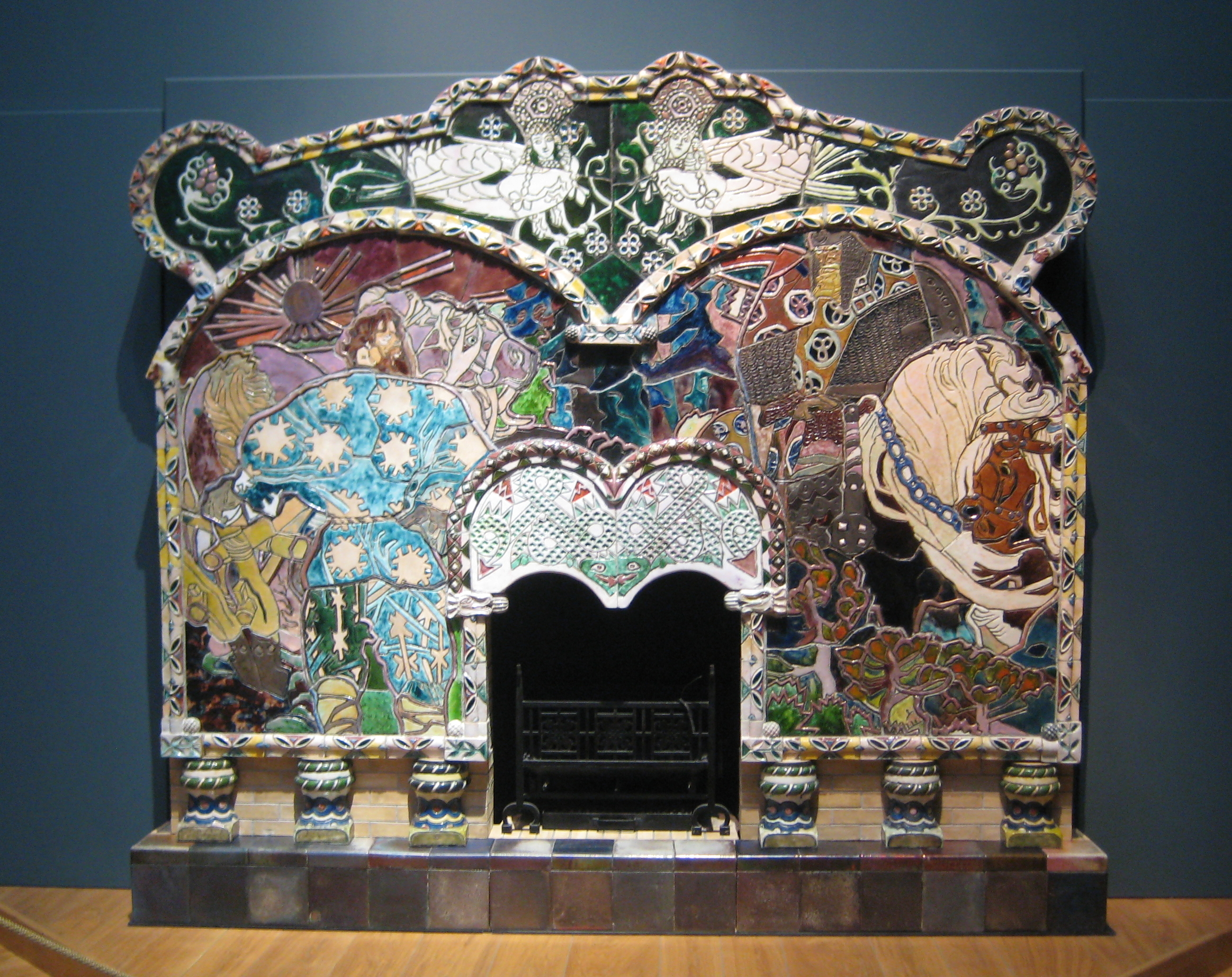 Камин «Микула Селянович и Вольга»